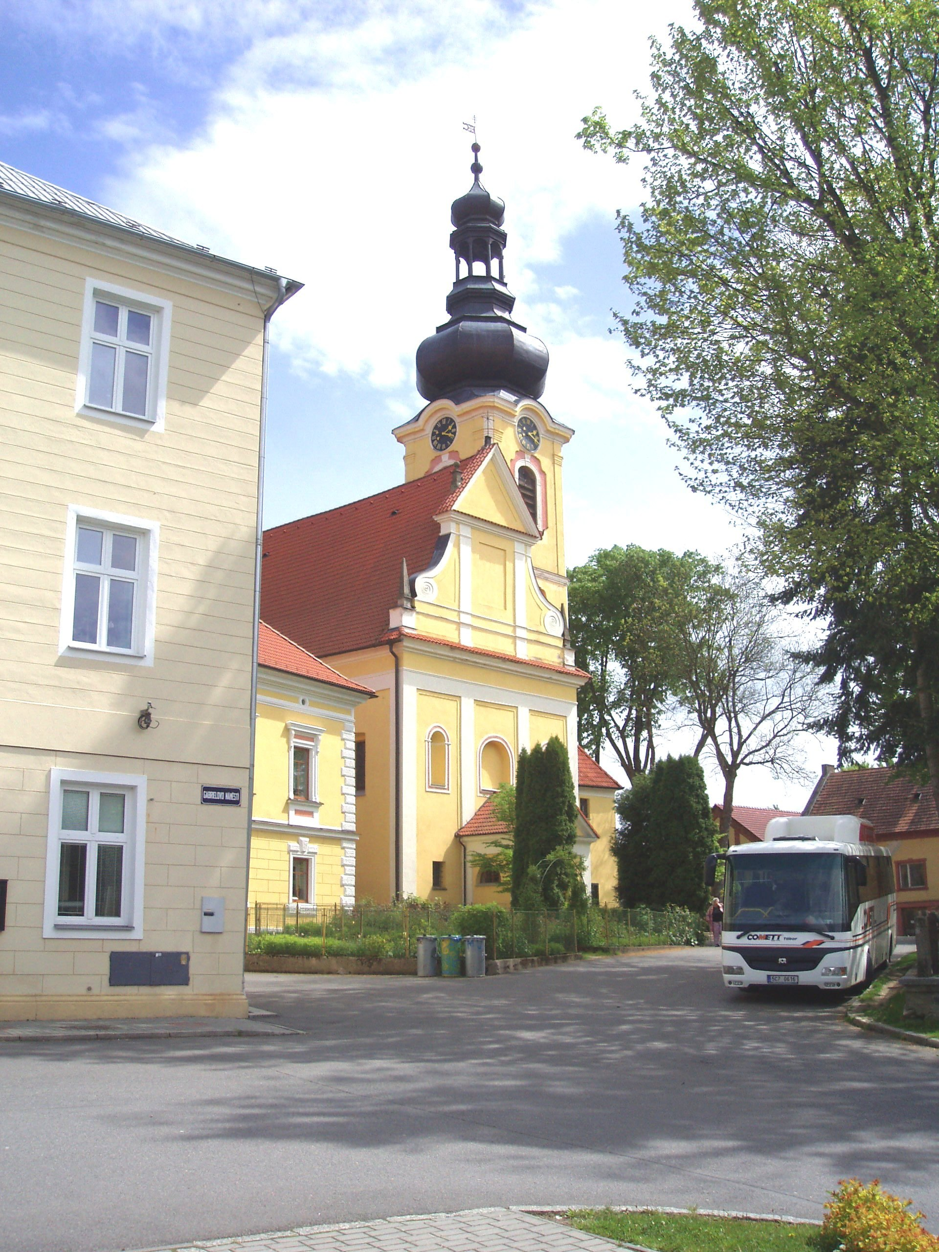 Chýnov - kostel nejsvětější trojice